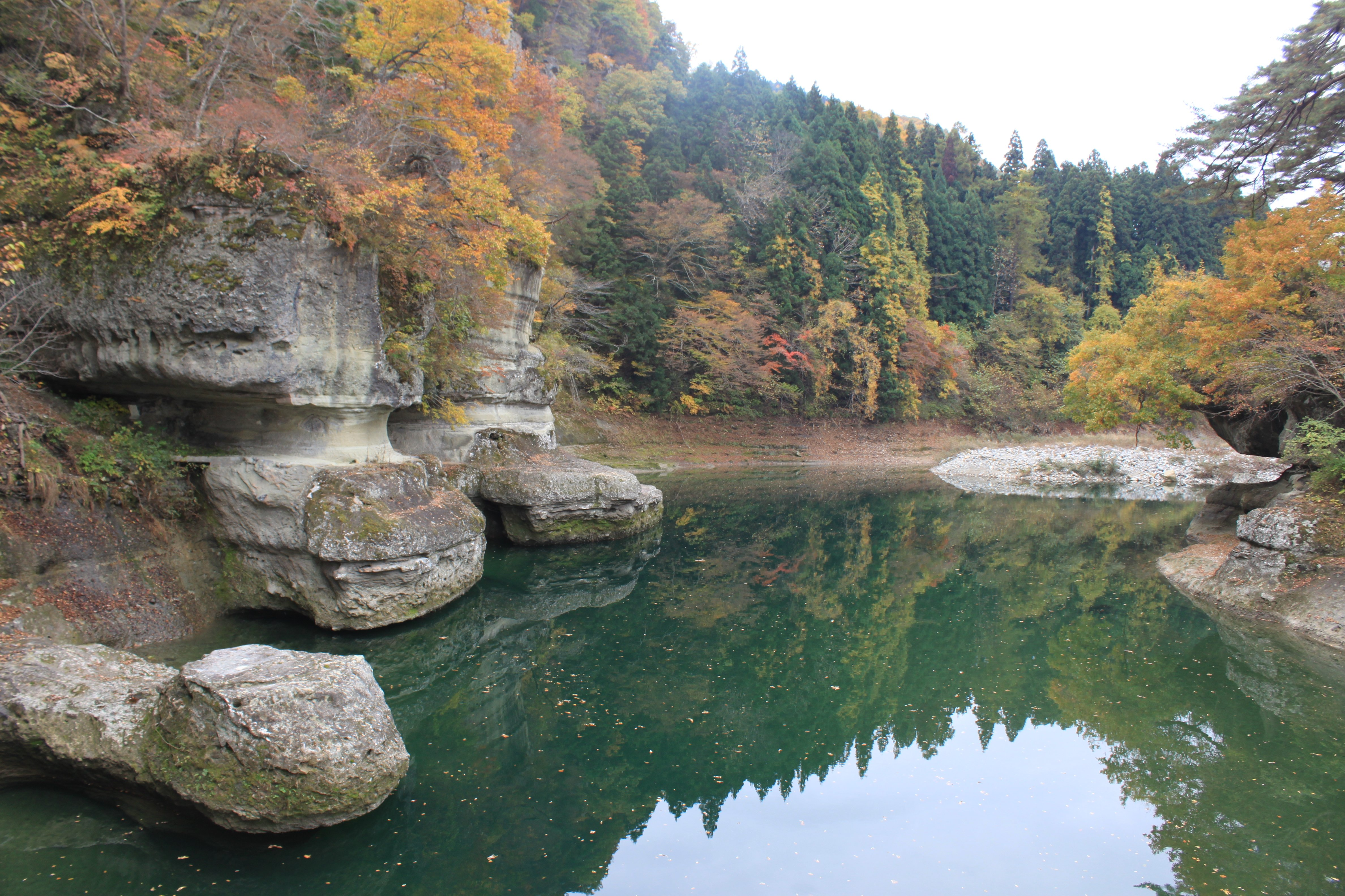 塔のへつり